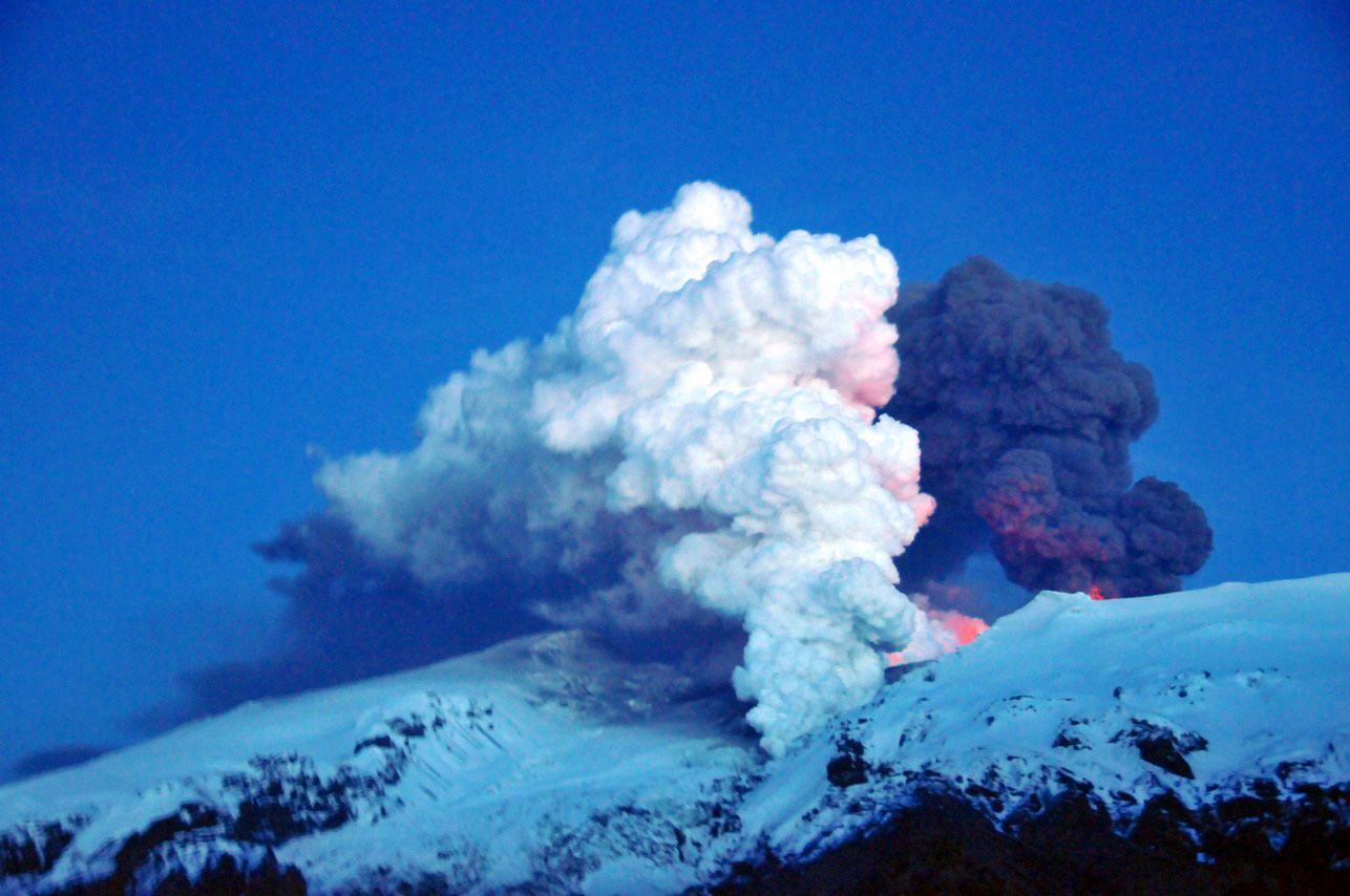 Eyjafjallajökull / Iceland